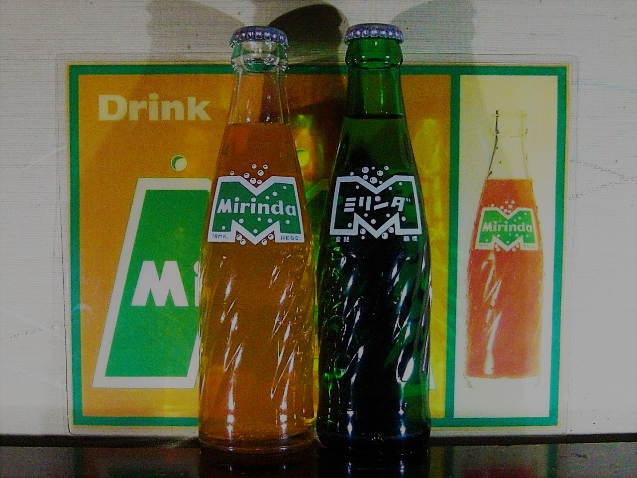 ミリンダ 日本販売品